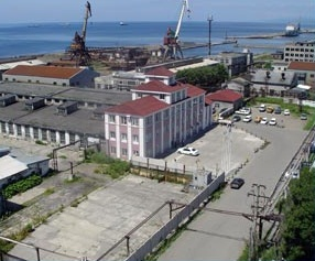 Холмский СРЗ